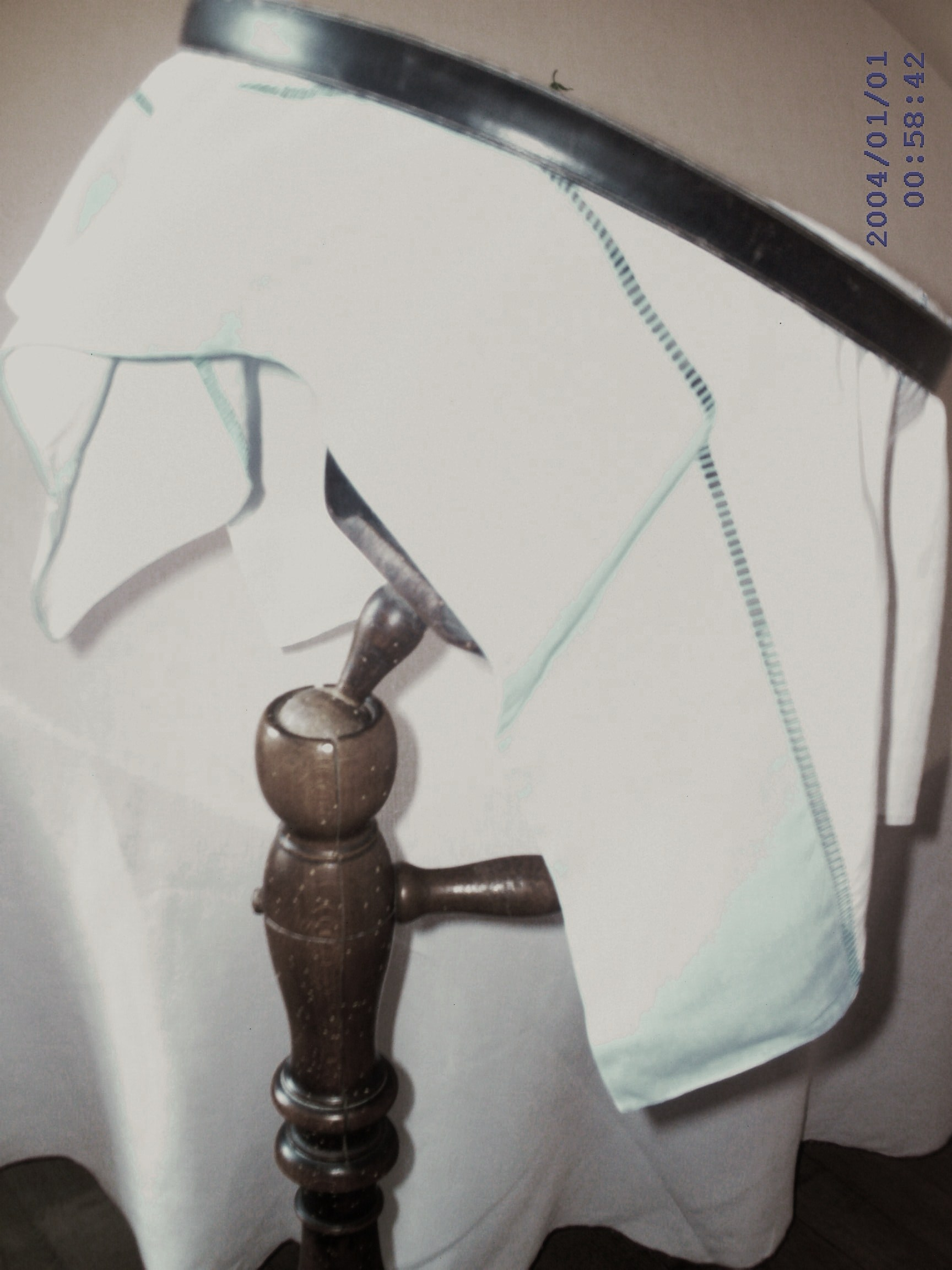 Métier à broder à rotule spécifique de Fontenoy-le-Château